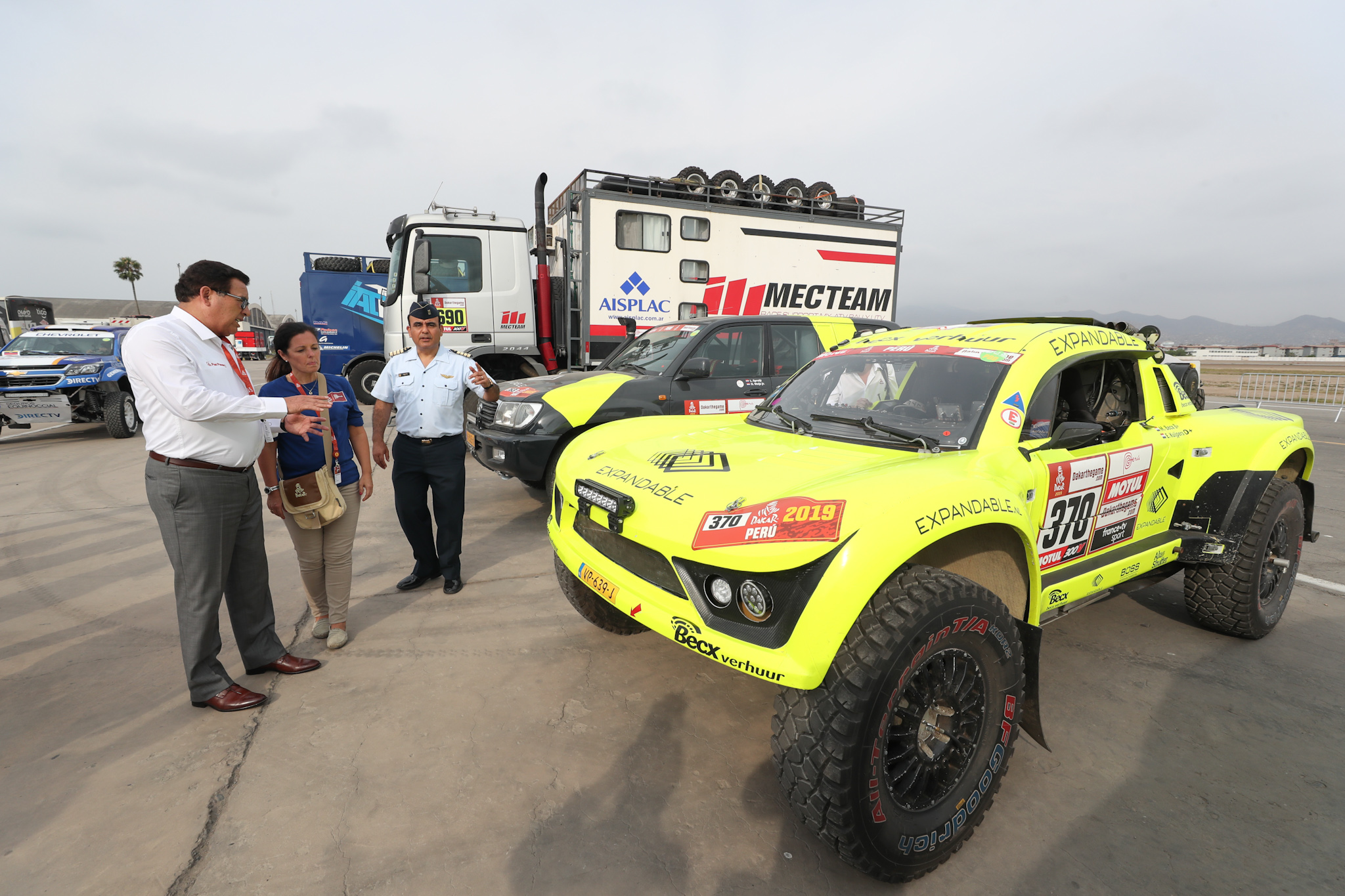 MINISTRO DE DEFENSA VISITÓ ÁREA DE REVISIONES TÉCNICAS DEL RALLY DAKAR EN LA BASE AÉREA DE LAS PALMAS.